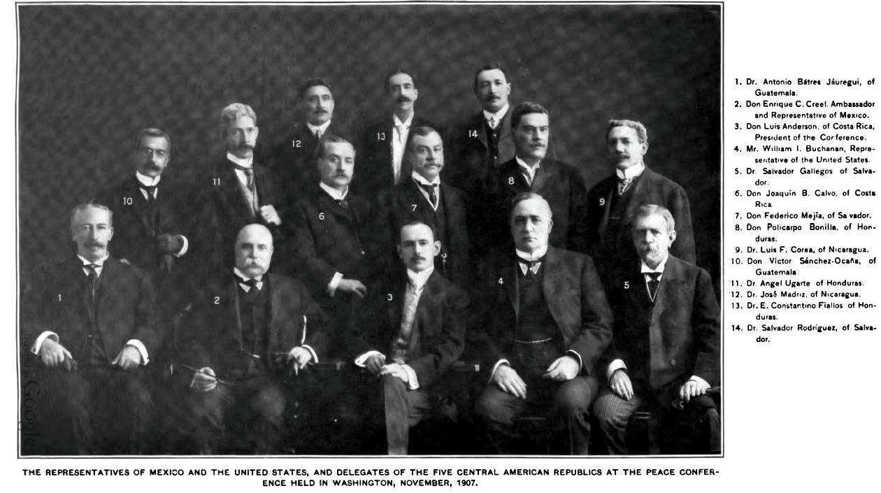 Opening Ceremony of the Peace Conference of the Central American States in 1907